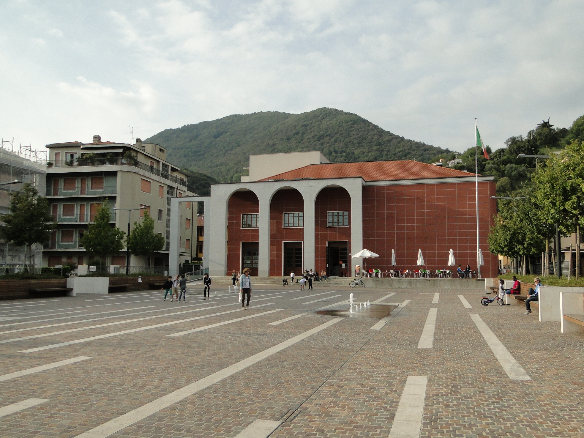 Piazza libertà con cine-teatro "Modernissimo", Nembro (BG)